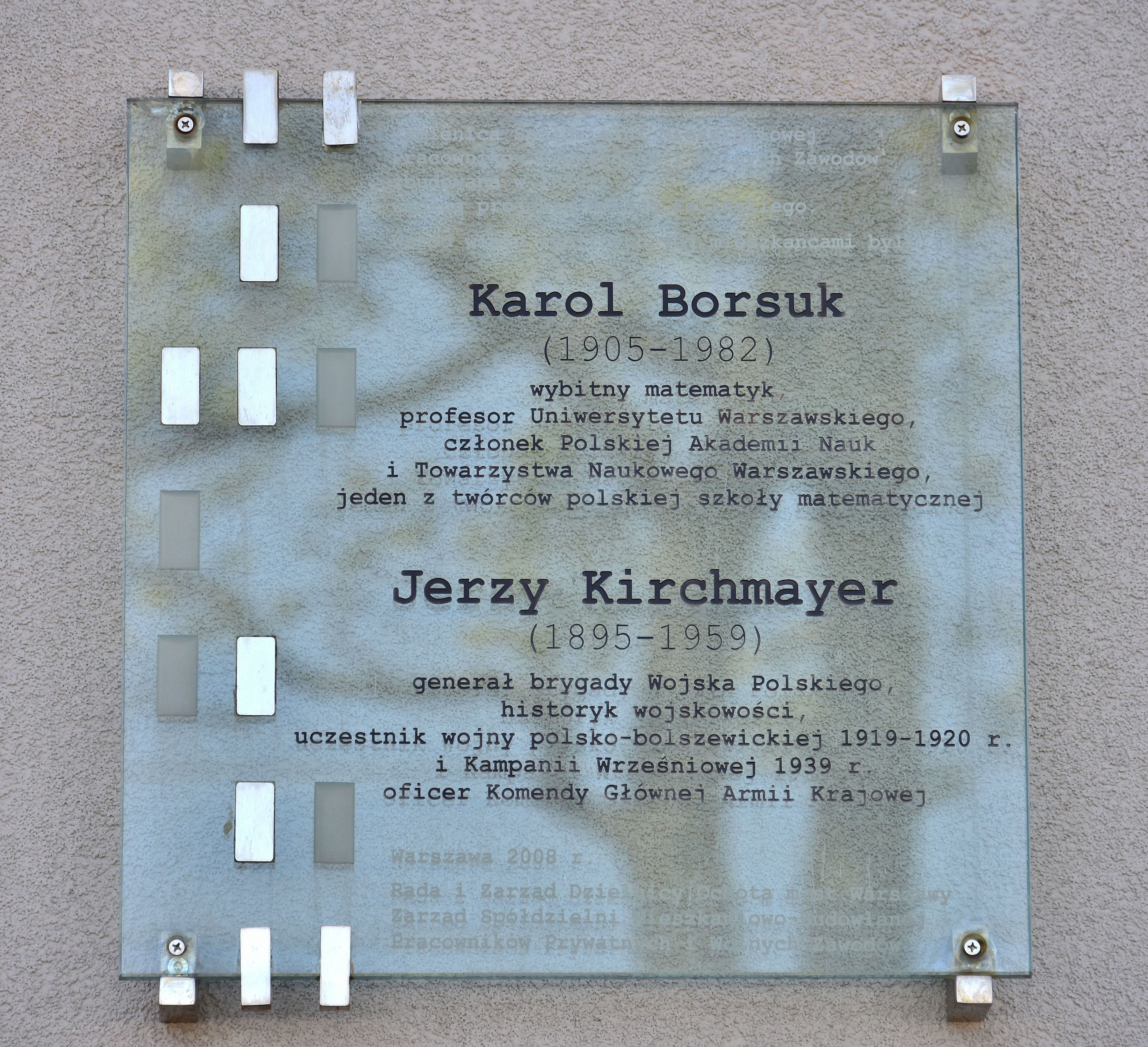 Tablica upamiętniająca Karola Borsuka i Jerzego Kirchmeyera przy ul. Filtrowej 63 w Warszawie